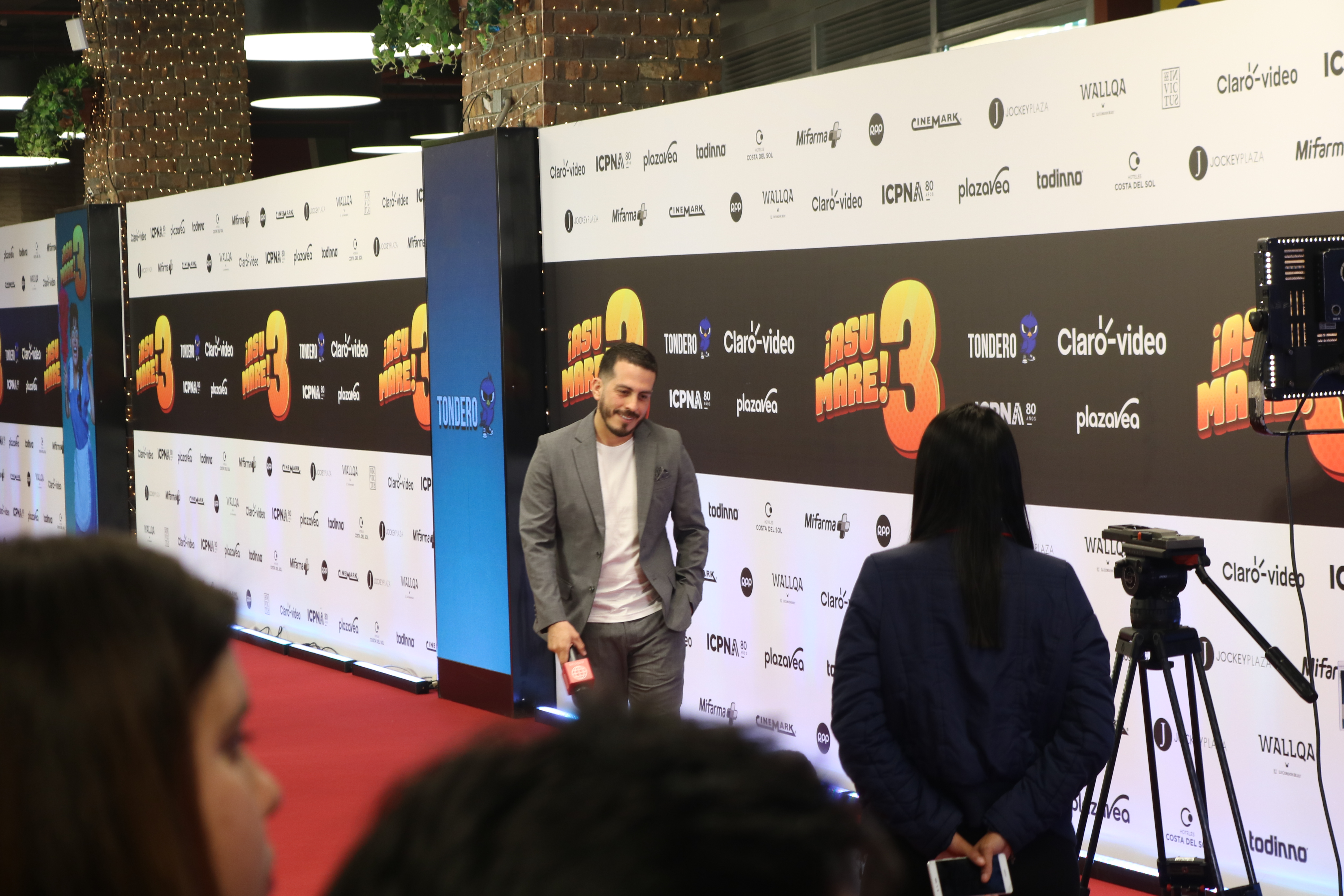 Previa a la alfombra roja de Asu Mare 3.